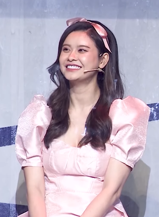 Trương Quỳnh Anh, ảnh chụp màn hình từ video của BEE Entertainment / Giải Trí (screen capture from video of BEE Entertainment / Giải Trí)